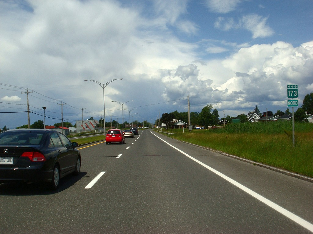 Photo de la route 173, à Pintendre, Québec, Canada.